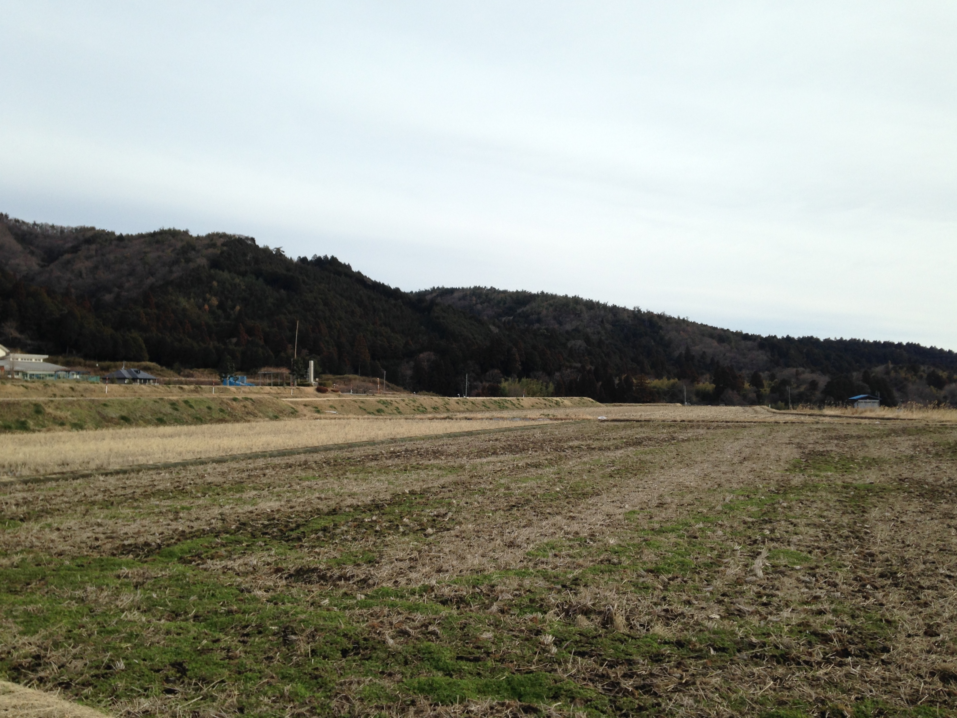 関ヶ原古戦場近くの田んぼ